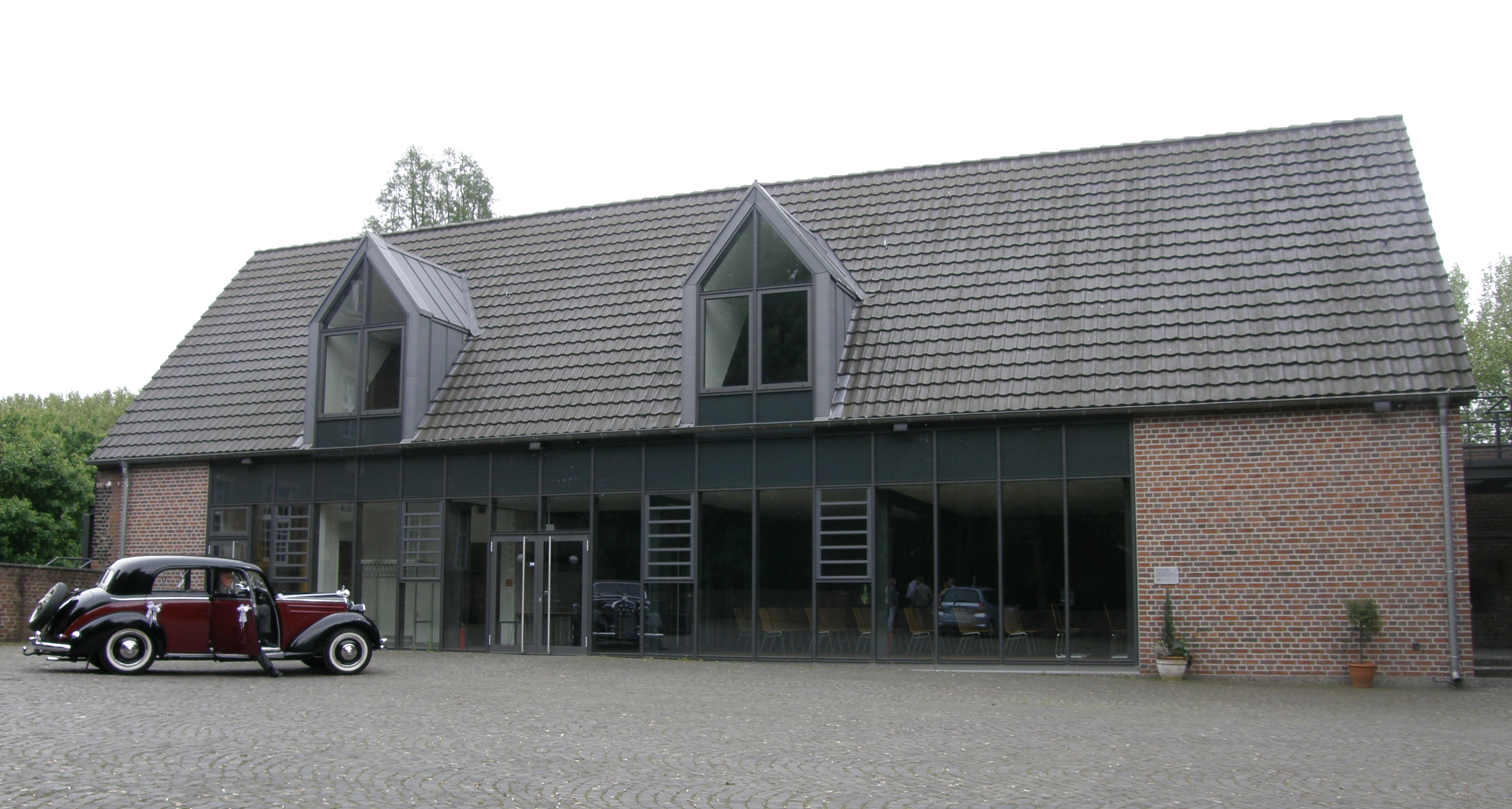 Burg Vondern , neu aufgebautes Stallgebäude mit Seminarräumen (und Hochzeitskutsche)